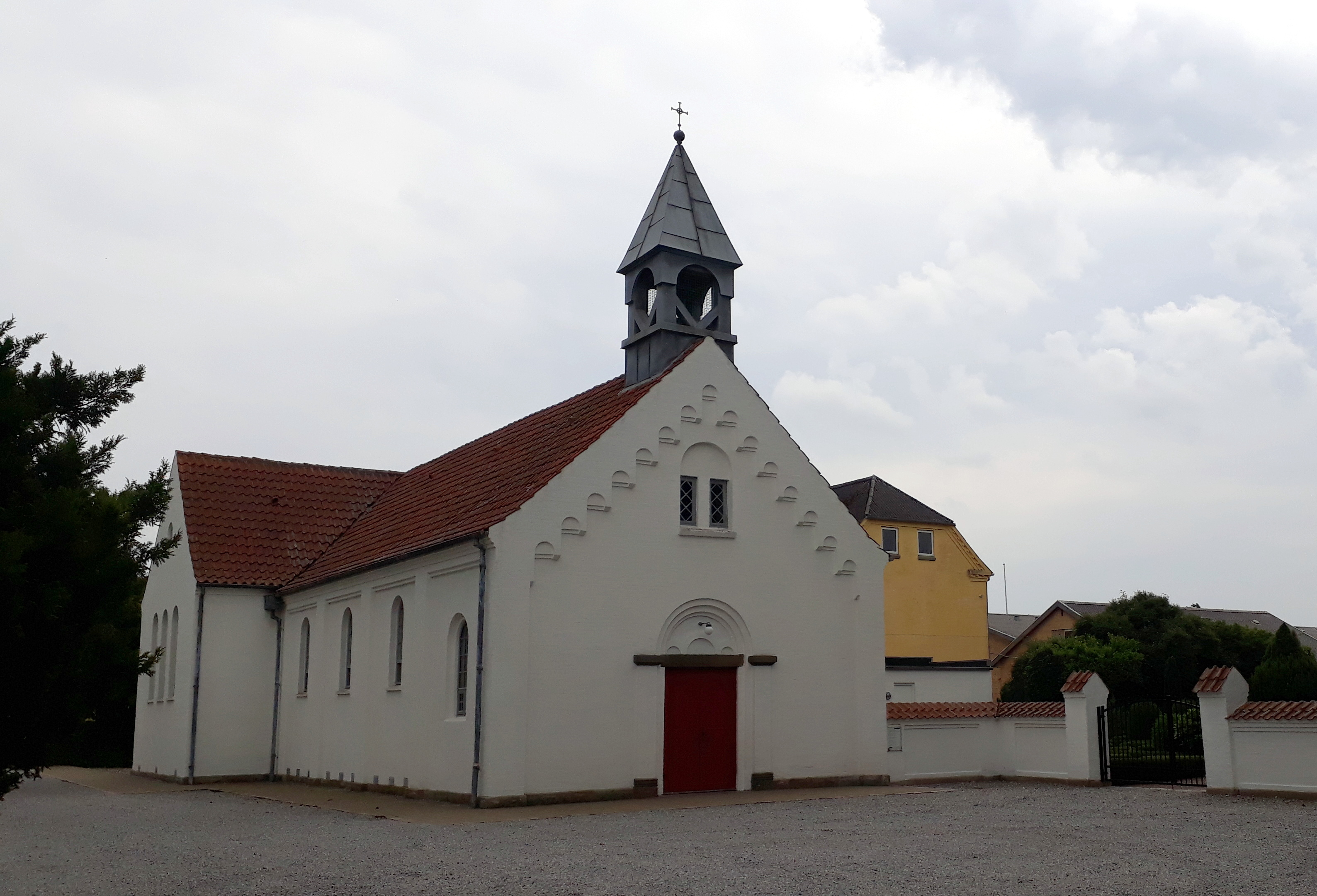 Valgmenighedskirken i Vrå